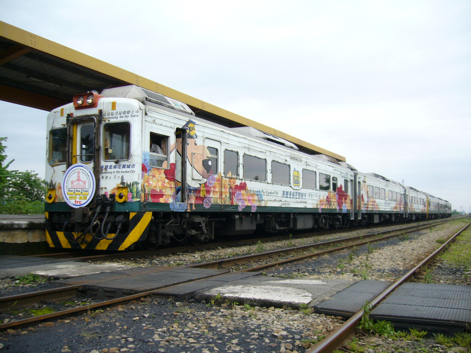 自強號停在內灣線九讚頭站。